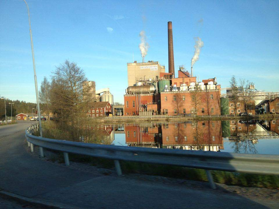 Pappersmassefabriken i Billingsfors.